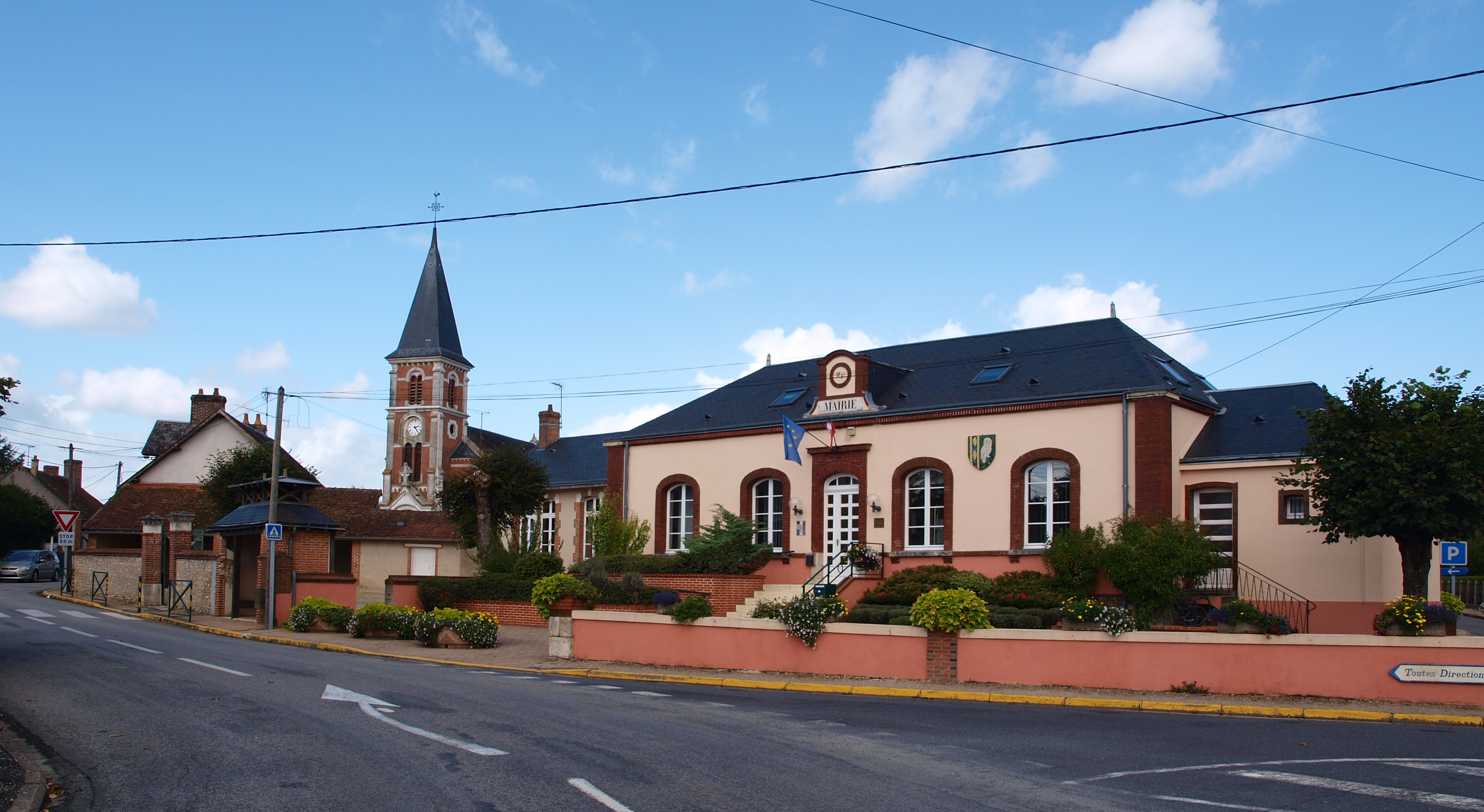 Les Choux (Loiret, France) ; mairie &, au loin, le clocher.